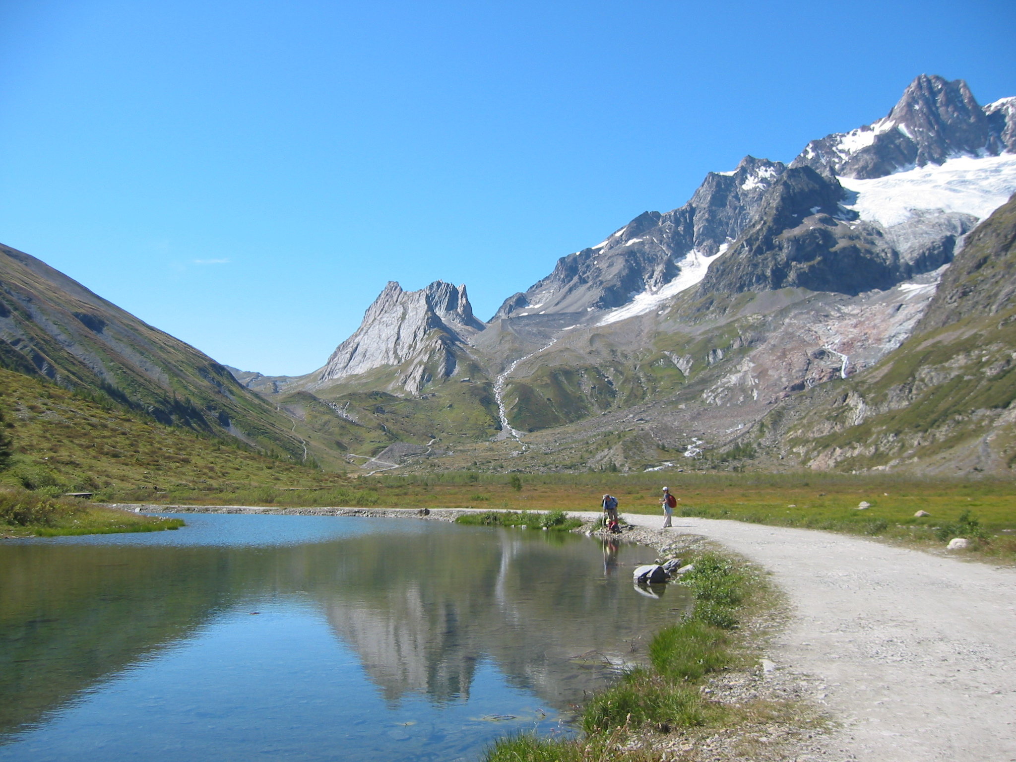 Paesaggio della Val Veny (Courmayeur), sullo sfondo il rifugio Elisabetta